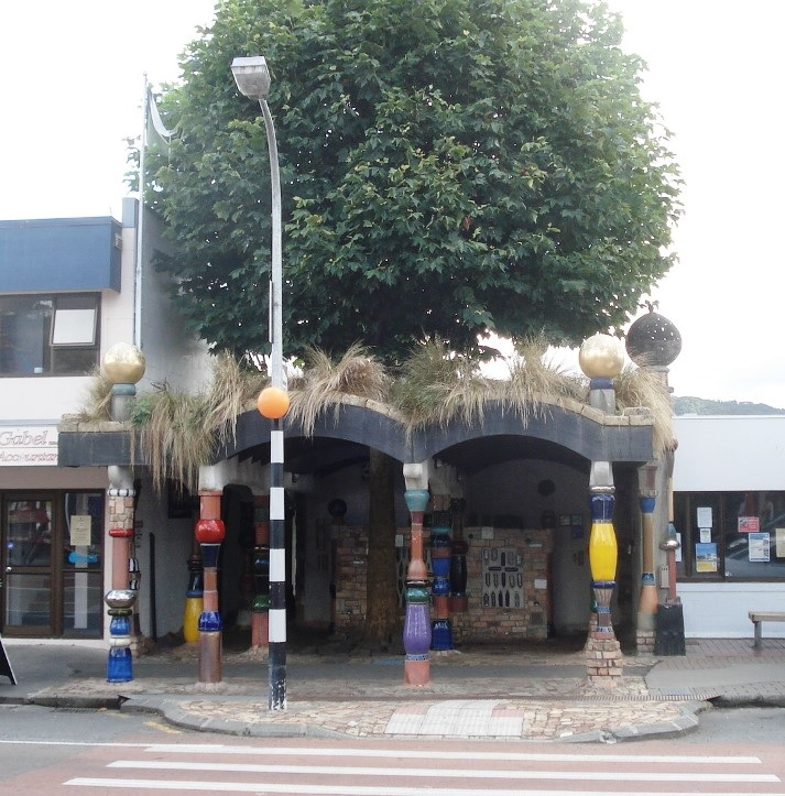 NZ_-_Kawakawa_-_Hundertwasser_toilets